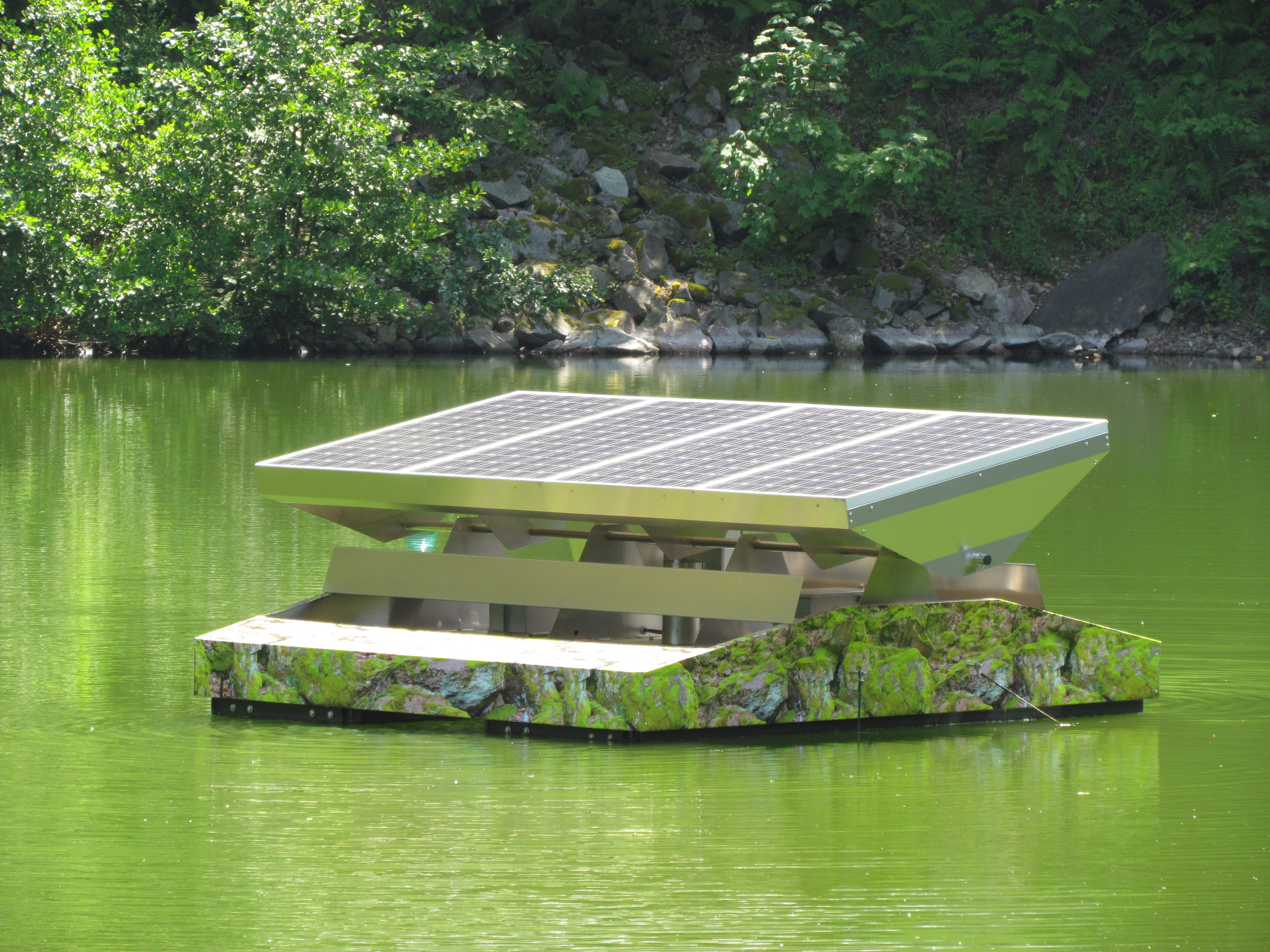 Bildinhalt: Die solargetriebene Umwälzpumpe "aquamotec" auf dem Petersee (Waldenecksee) pumpt Wasser vom Seegrund an die Oberfläche und soll dadurch den Sauerstoffgehalt des Seewassers erhöhen. Sie wurde 2014 im Auftrag des Angelsportvereins Sinzheim installiert. Aufnahmeort: Sinzheim, Deutschland